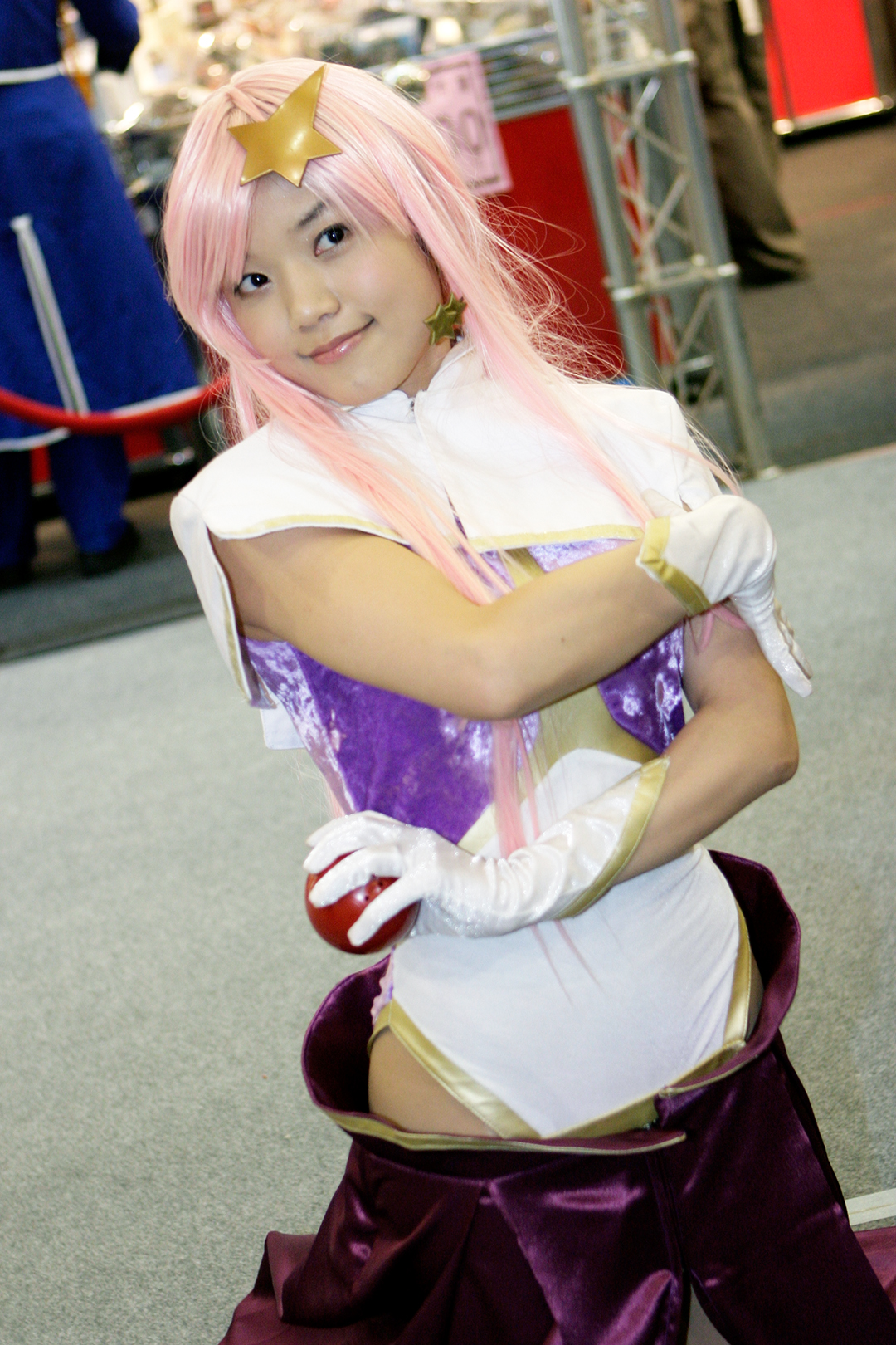 2006漫畫遊戲玩具大展，《機動戰士鋼彈SEED DESTINY》蜜雅·坎貝爾cosplayer。